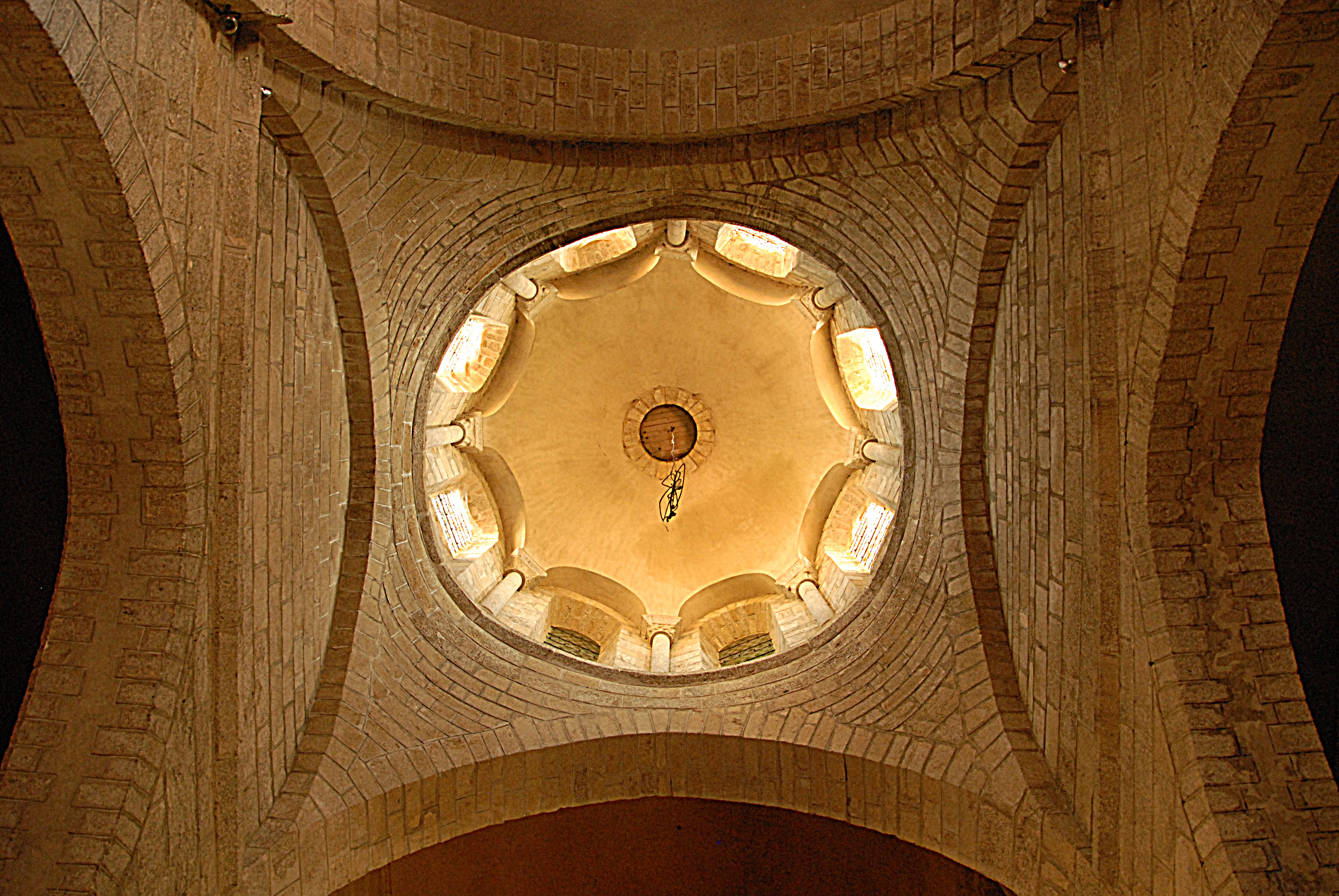 Stiftskirche St.-Léonard-de-Noblat, Vierungslaterne von unten